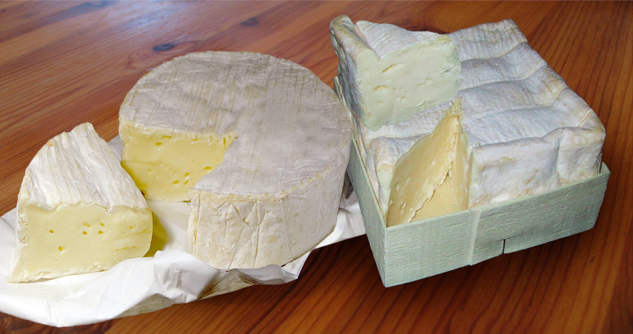 fromages de Normandie, Camembert et petit Pont-l'évêque